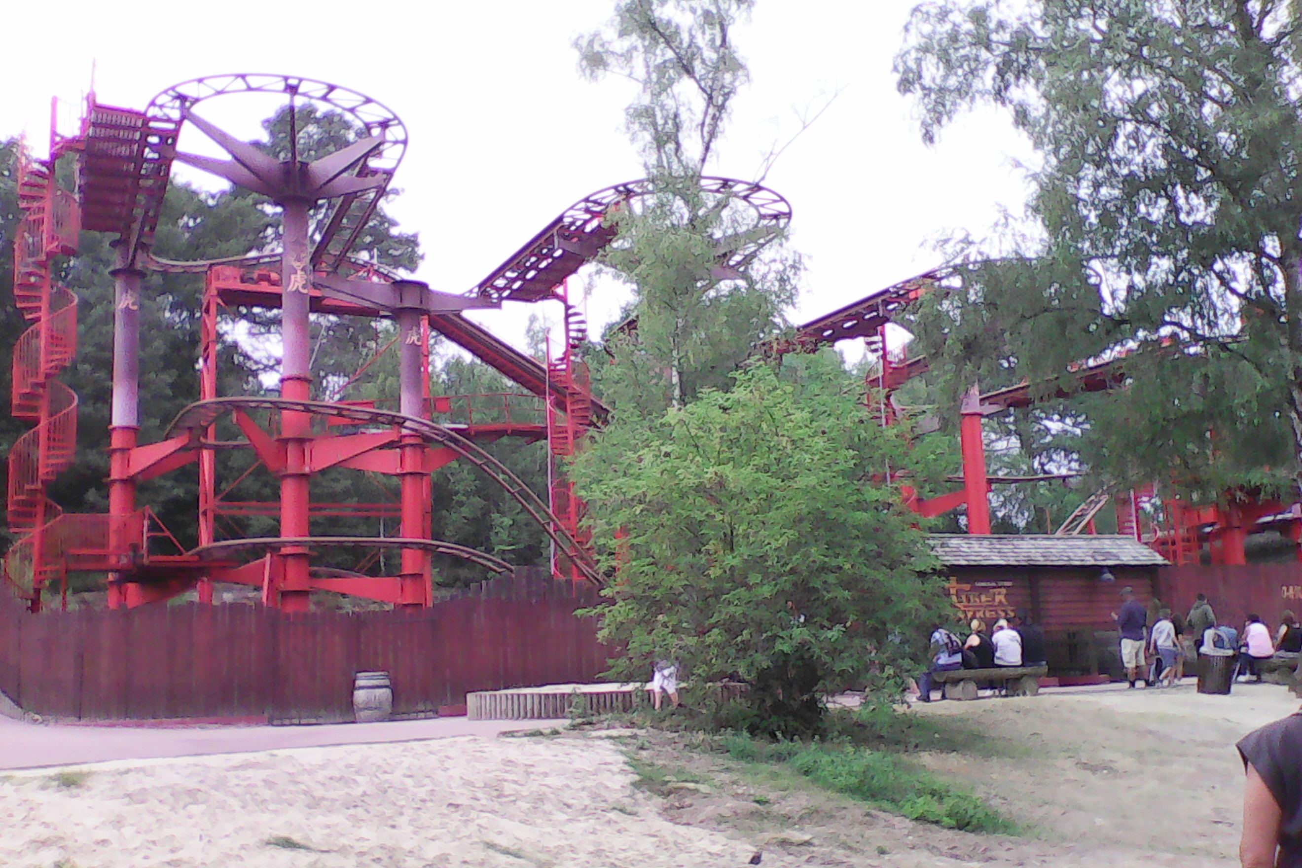 Attraction Tiger Express à la Mer de sable